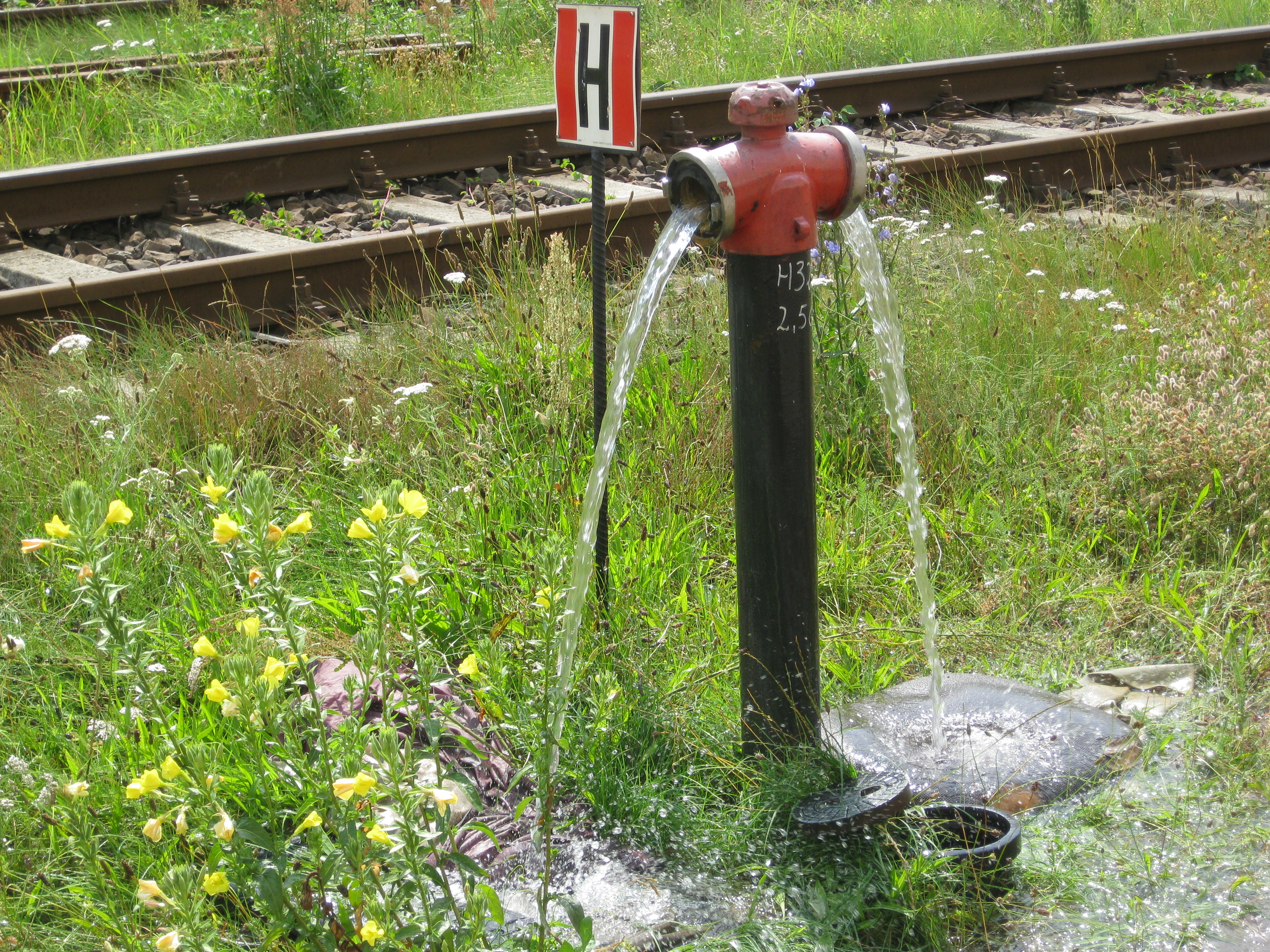 Hydrant na terenie PKP Cargo w Rzepinie.